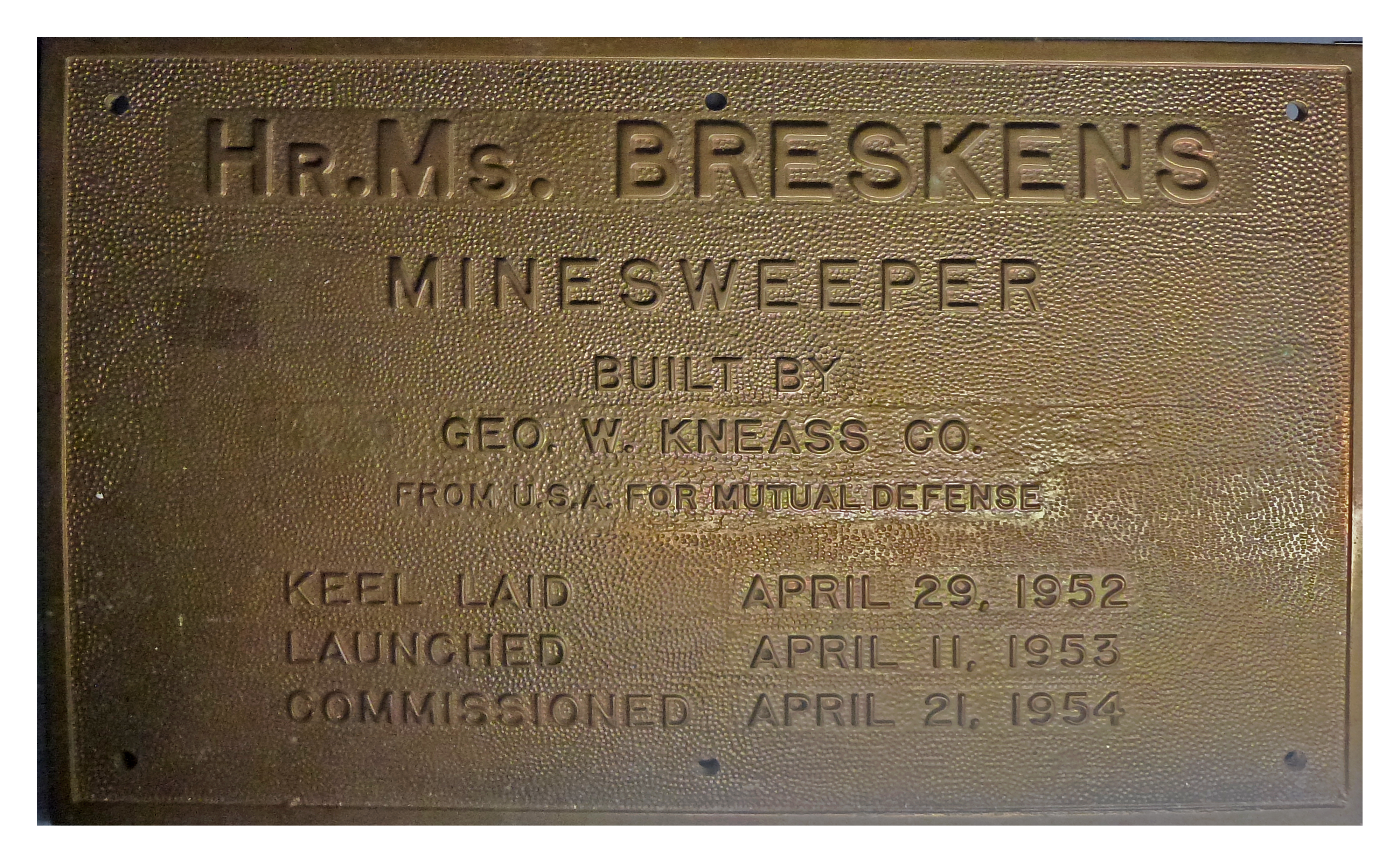 Plaquette van de mijnenveger Hr.Ms. Breskens. ex-USS AMS 148. De plaquette is te zien in het Marinemuseum (Den Helder). Via het Mutual Defense Assistance Program werden grote aantallen mijnenvegers aangeschaft, deze werden gefinancierd door de Amerikanen. De Breskens was een van de veertien schepen van de Beemster-klasse, deze werden allemaal op Amerikaanse werven gebouwd. Gebouwd door George W. Kneass Co. te San Fransisco, Ca. Op stapel gezet 29 april 1952. Te water gelaten 11 april 1953. In gebruik van 21 april 1954 te San Fransisco tot 1 juli 1976. Naamsein M 855 ex - AMS 148. Bron:Onze vloot en Marinemuseum (Den Helder)